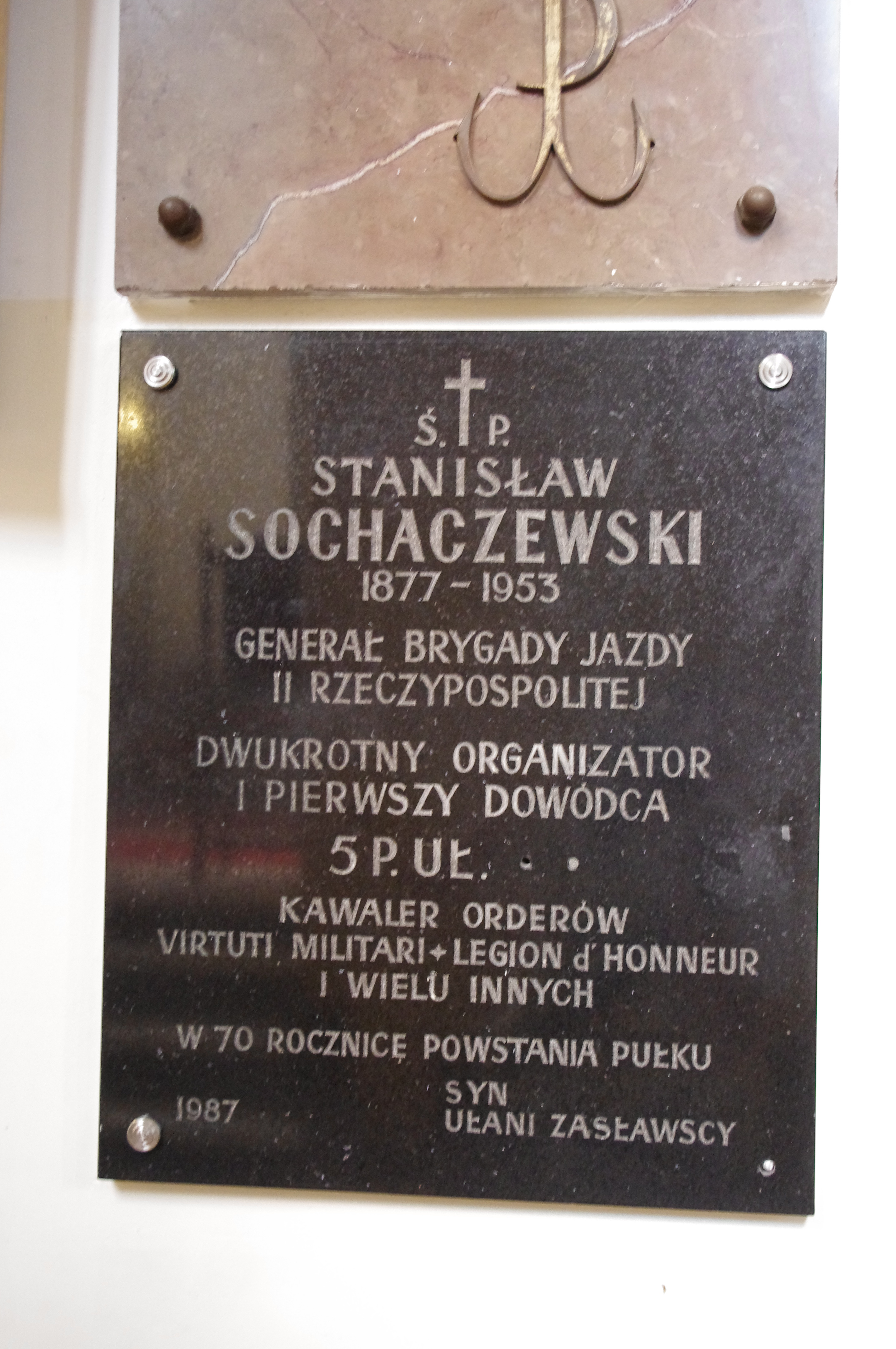 Tablica upamiętniająca Stanisława Sochaczewskiego w Kościele św. Stanisława Kostki w Warszawie